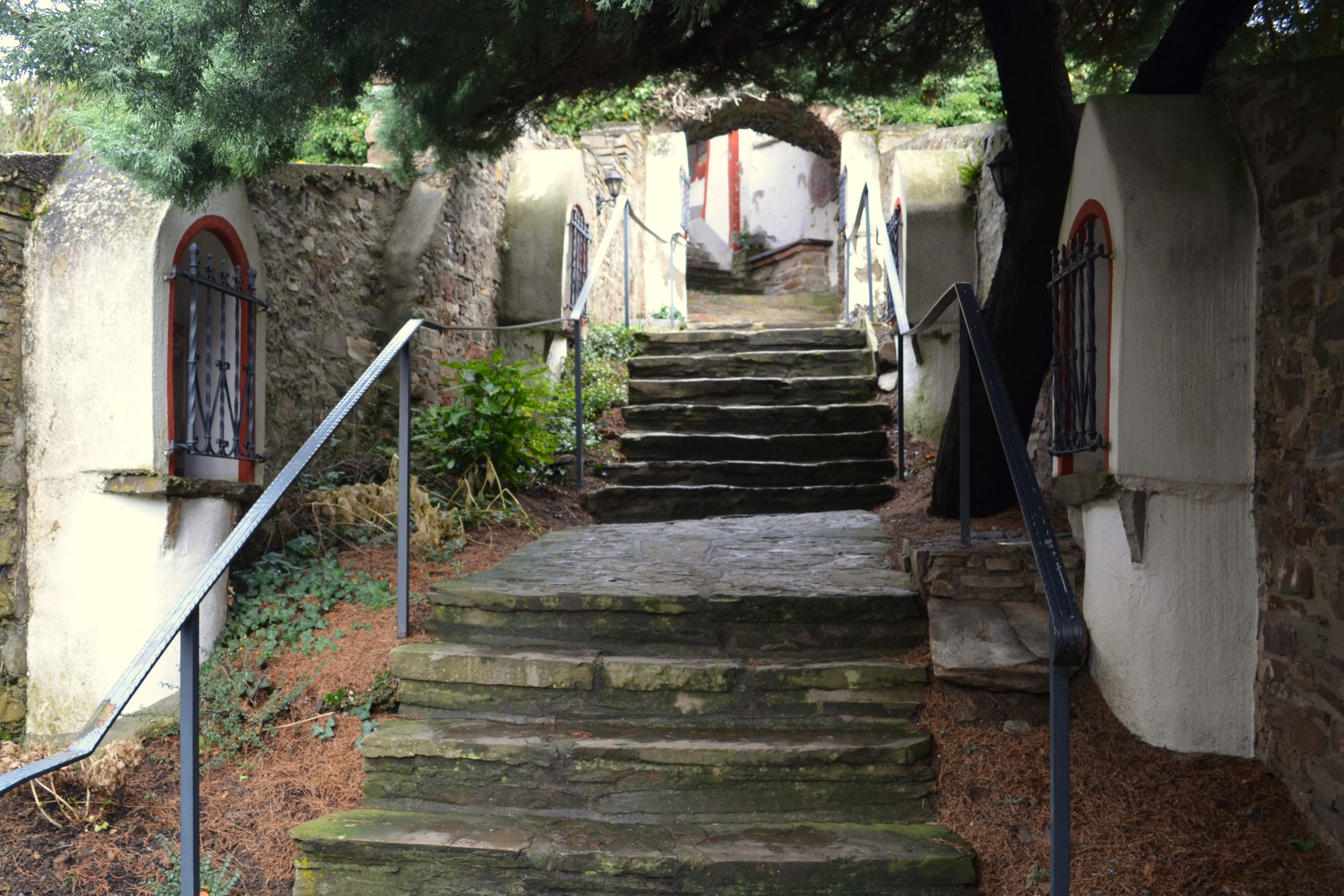 kruisweg